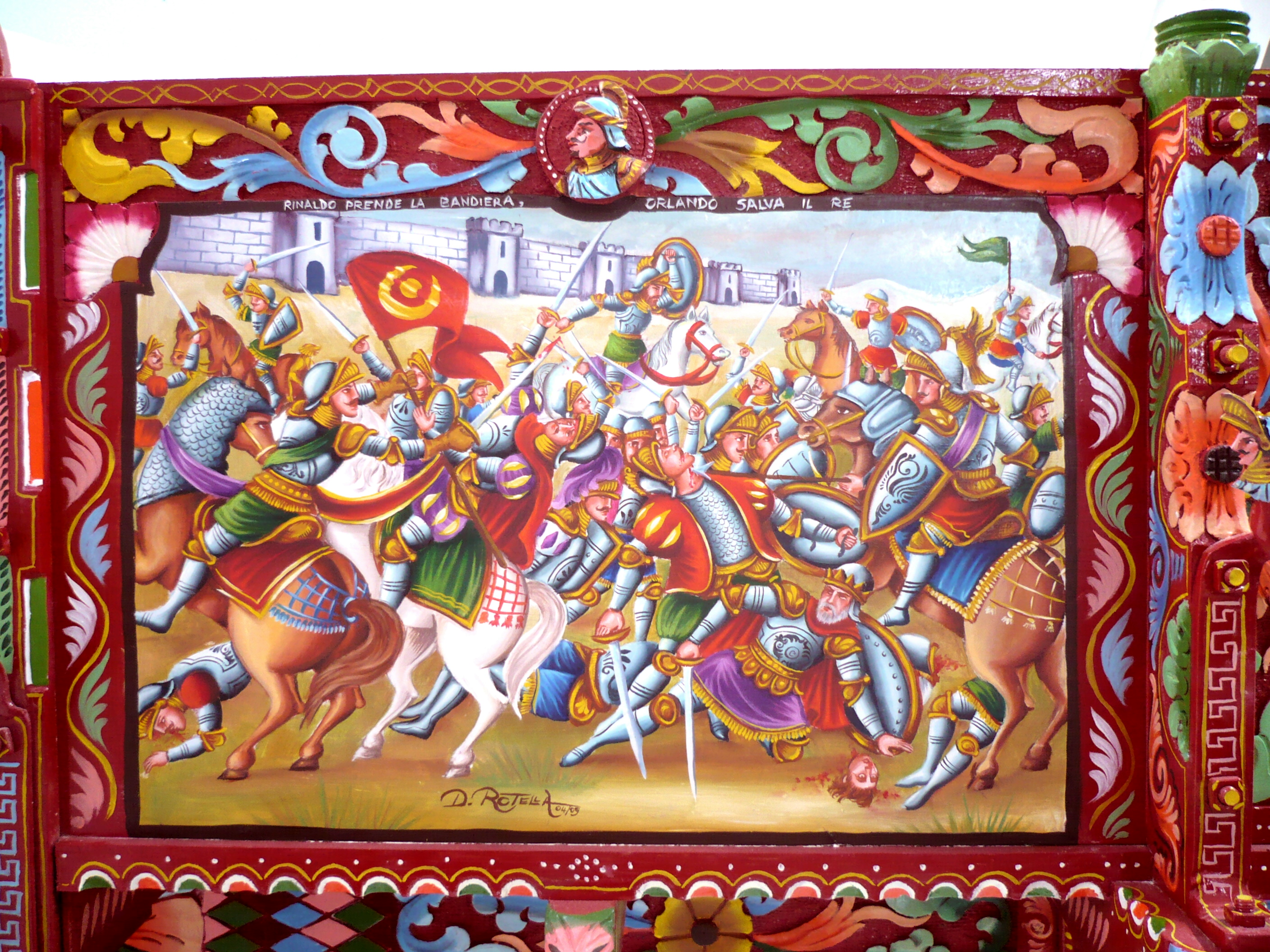 Sponda di carretto siciliano alla catanese, raffigurante paladini.